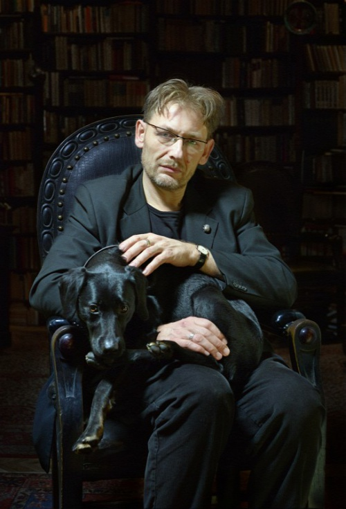 Bartis Attila román-magyar író, újságíró, fotóművész.